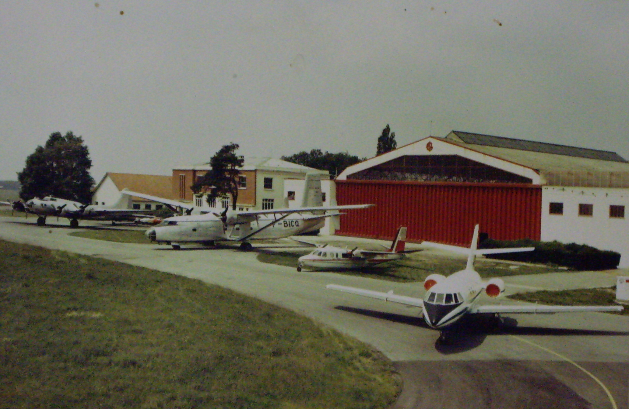 Photo prise à l'IGN de Creil, France On peux y voir un B-17, un Hurel, un AirCommander et un Mystère 20.